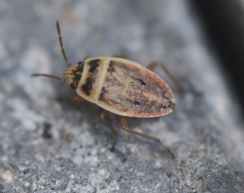 Wanzennymphe Emblethis cf. griseus am 16. Juni 2020 auf Pflastersteinen unterhalb einer Hauswand südlich von Mannheim